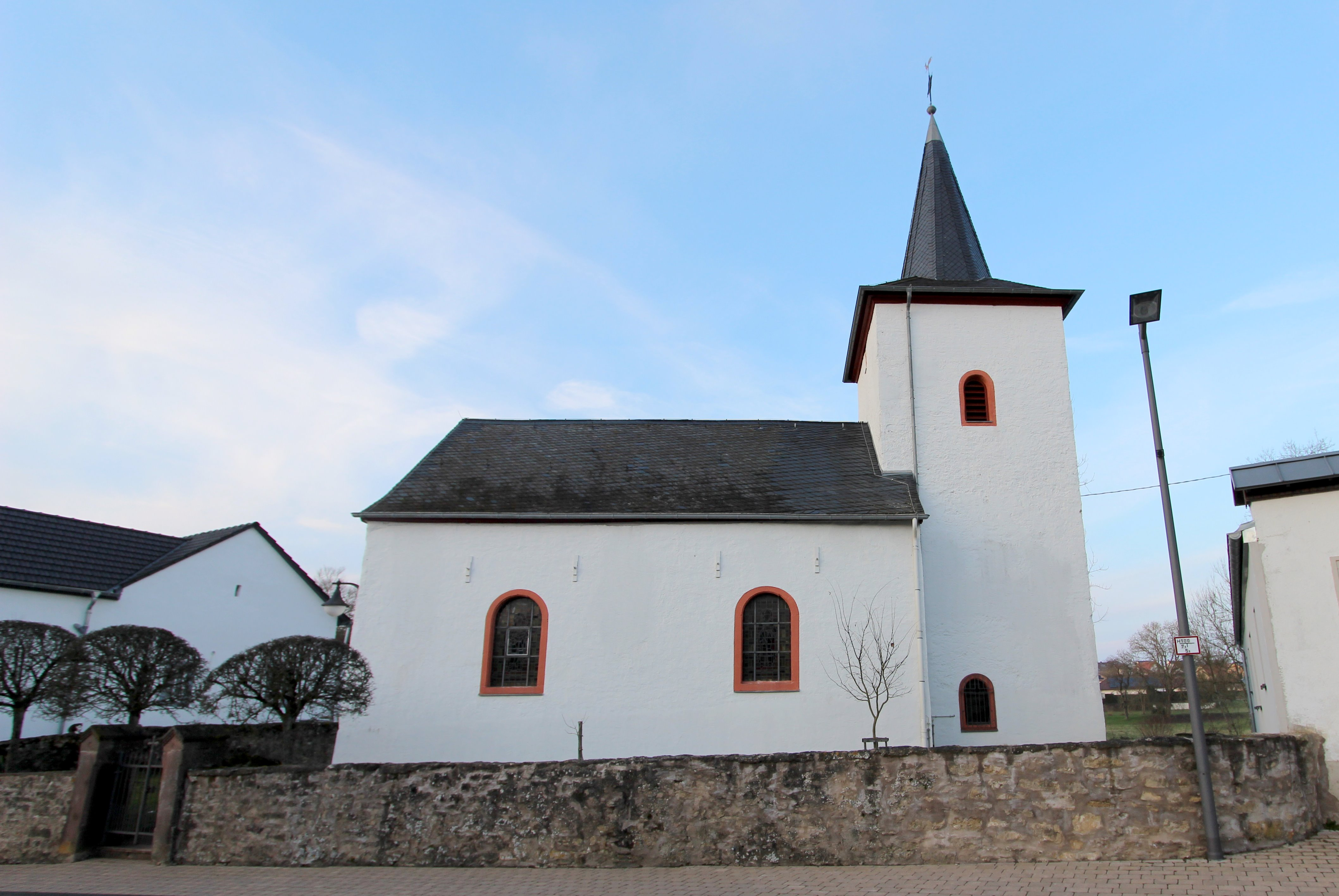 54634 Bitburg-Stahl, Oberweiser Straße 11. Saalbau, bezeichnet 1752, im Kern eventuell von 1426. Aufnahme von 2018.